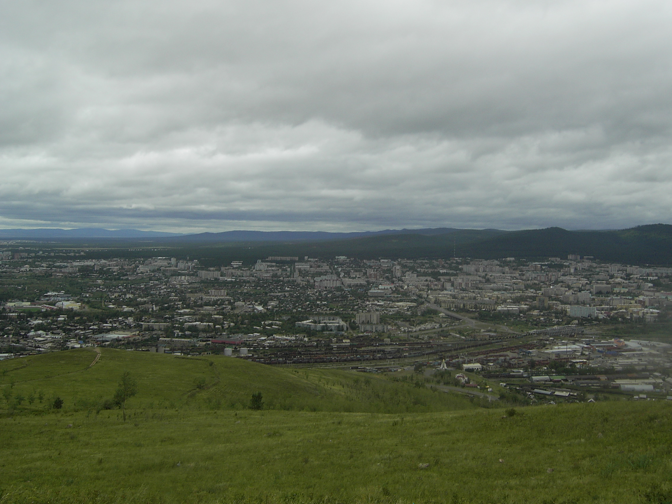 Blick auf Tschita vom Titovskaya Sopka, eigene Aufnahme